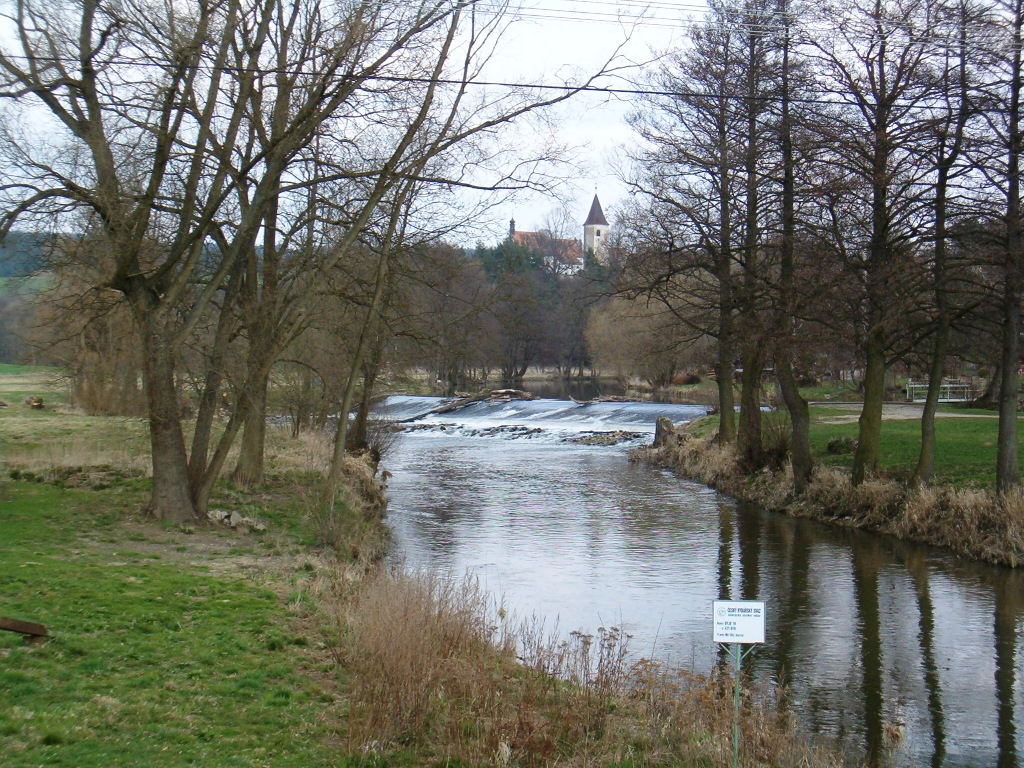 Splav na Moravské Dyji v Písečném